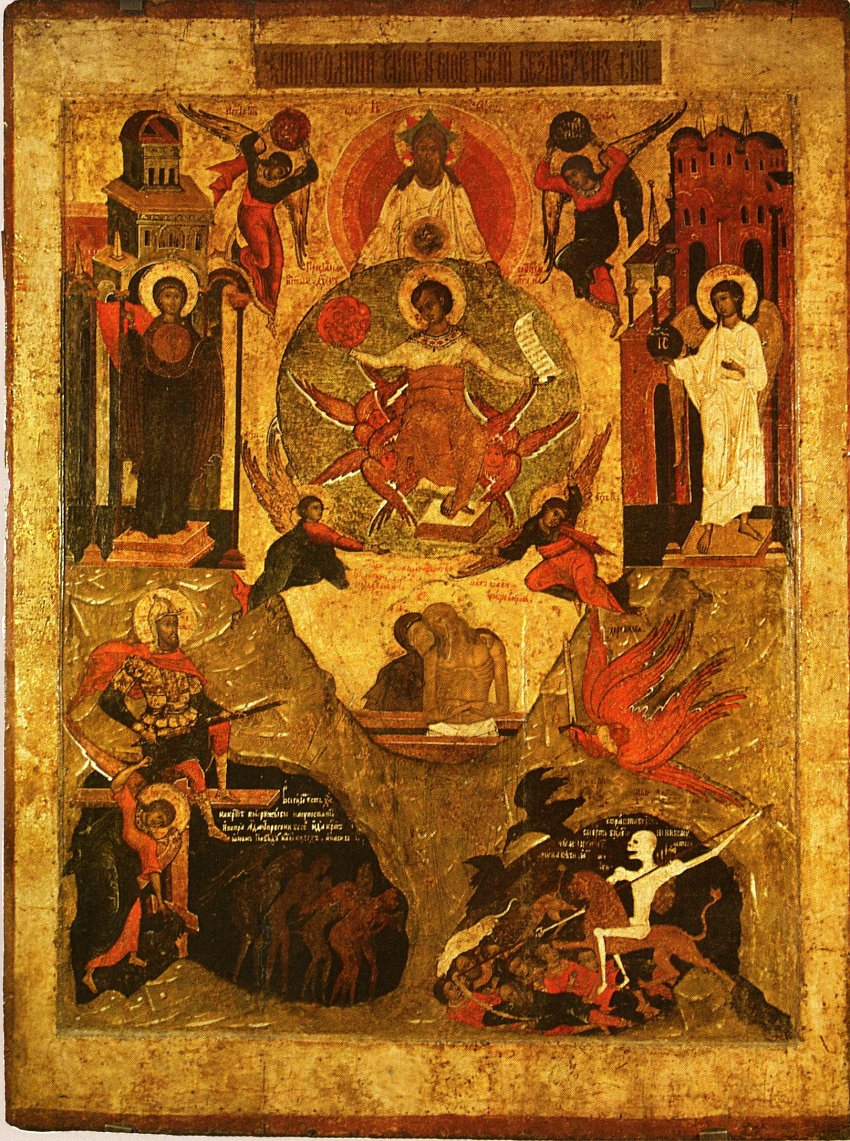 Единородный сын